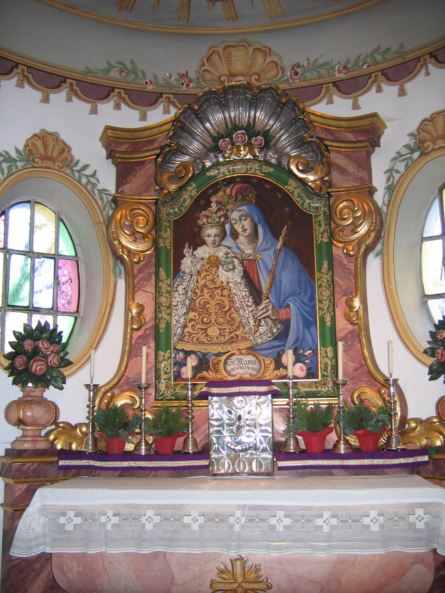 Der Altar der Kapelle von Bruck bei Neuburg-Dodnau.